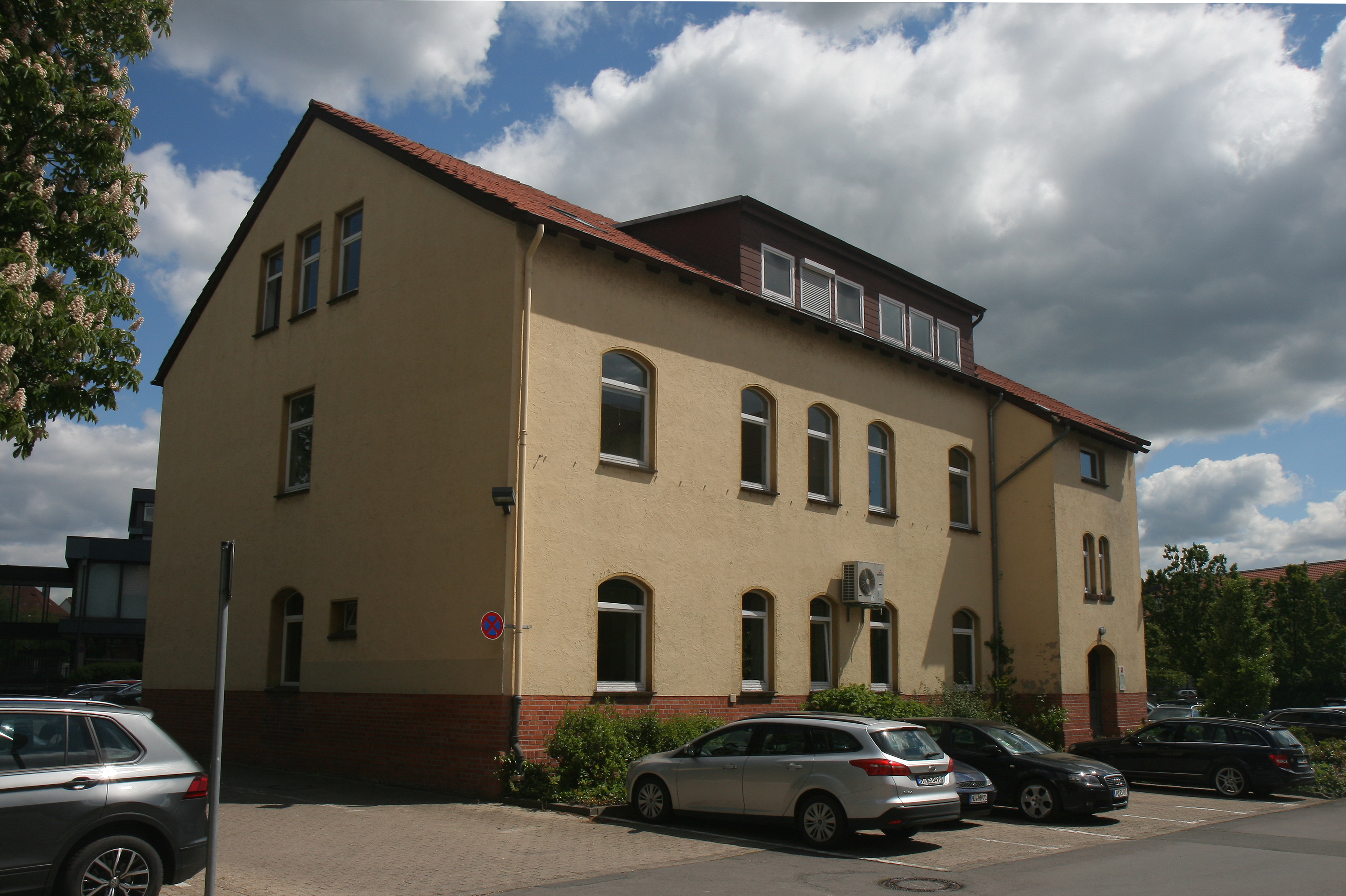 Amtsgericht Hildesheim — Registergericht (Gebäude B), Nebenstelle Bahnhofsallee 37 in Hildesheim.